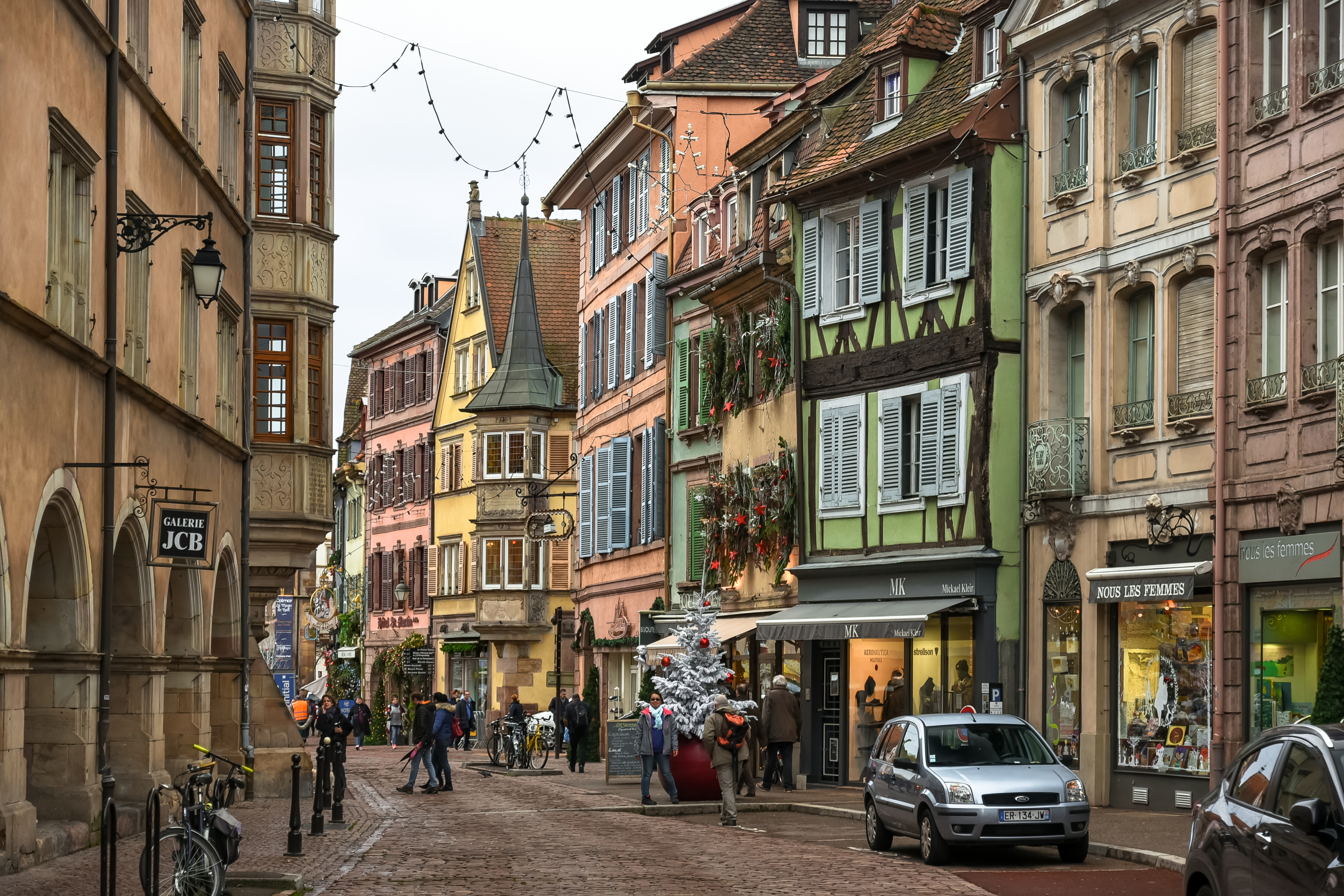 Colmar (Alsace, France)